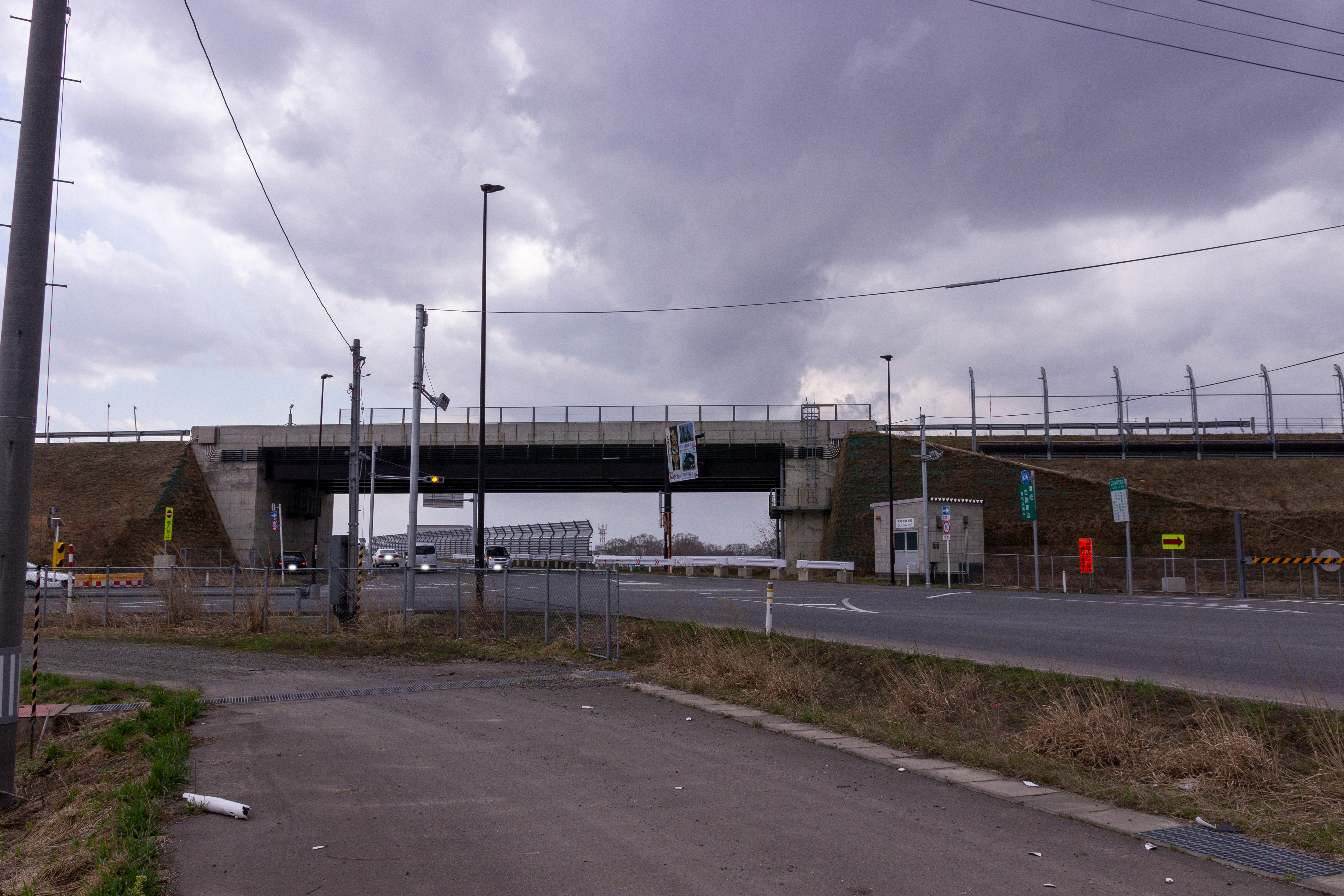 津軽自動車道 - 五所川原北IC 一般道との結節点